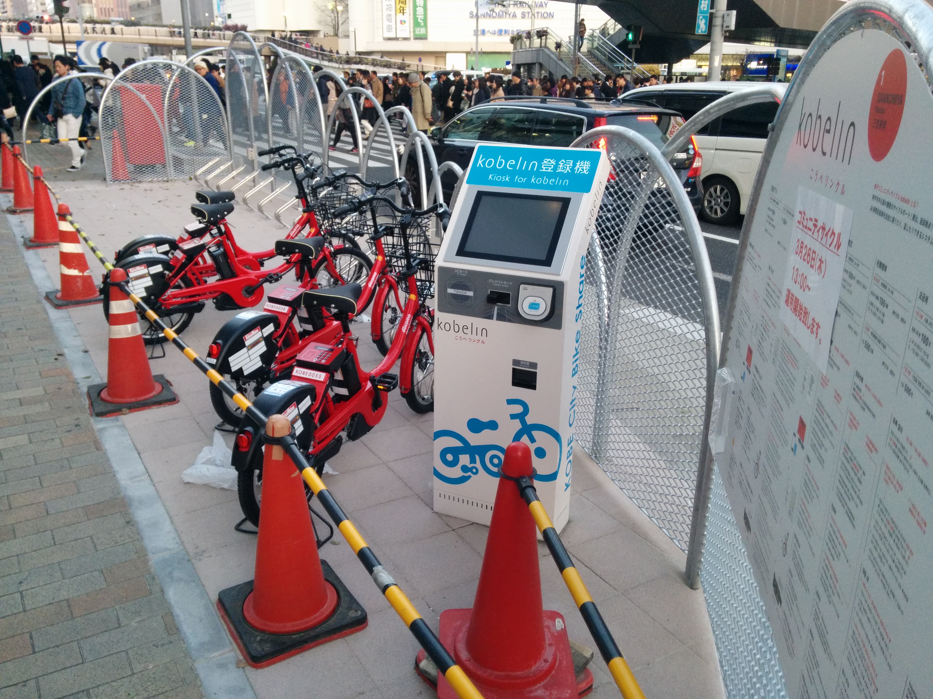 神戸コミュニティサイクル「コベリン 」 始まりそうだ！ #kobelin - 三宮 神戸交通センタービル前にて